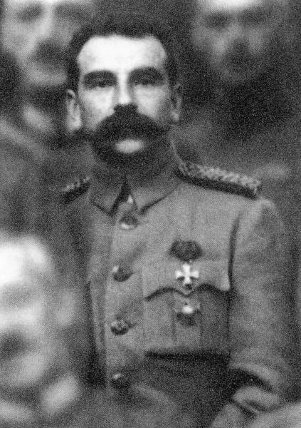 Виктор Иванович Клименко, генерал-майор, герой Первой мировой войны.